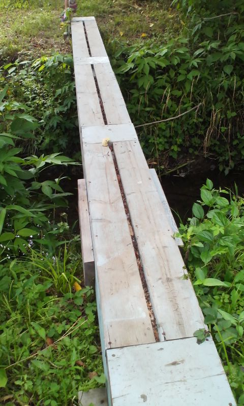 相模三川公園に通じる道の鳩川の橋です。